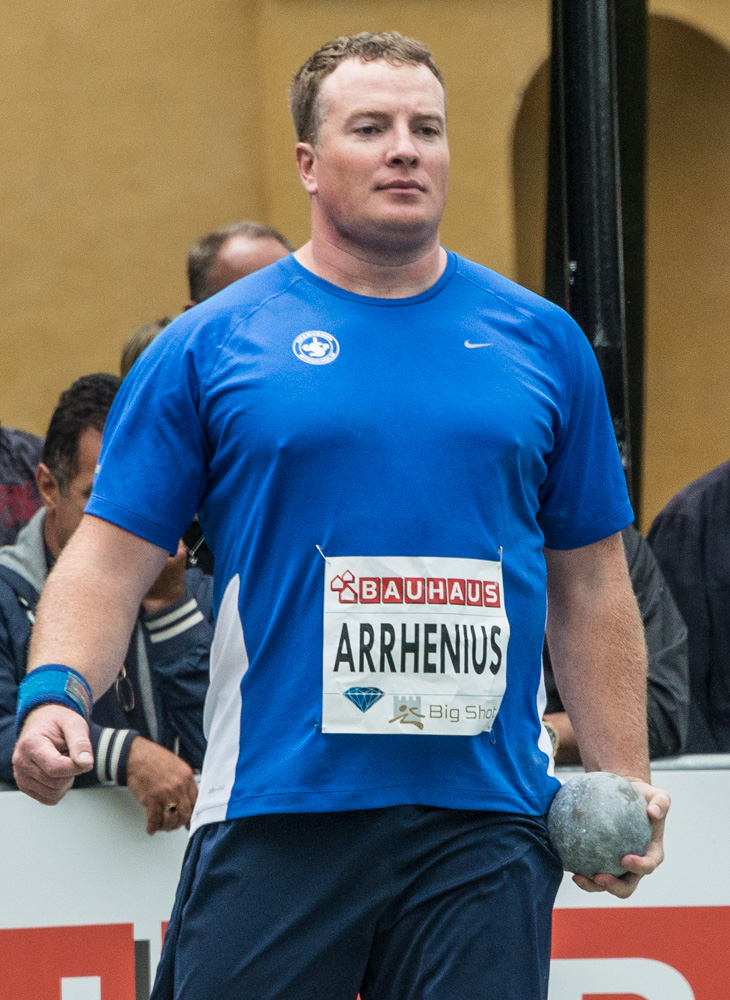 Niklas Arrhenius under Bauhaus-galan (Diamond League) i Kungsträdgården i Stockholm den 29 juli 2015.